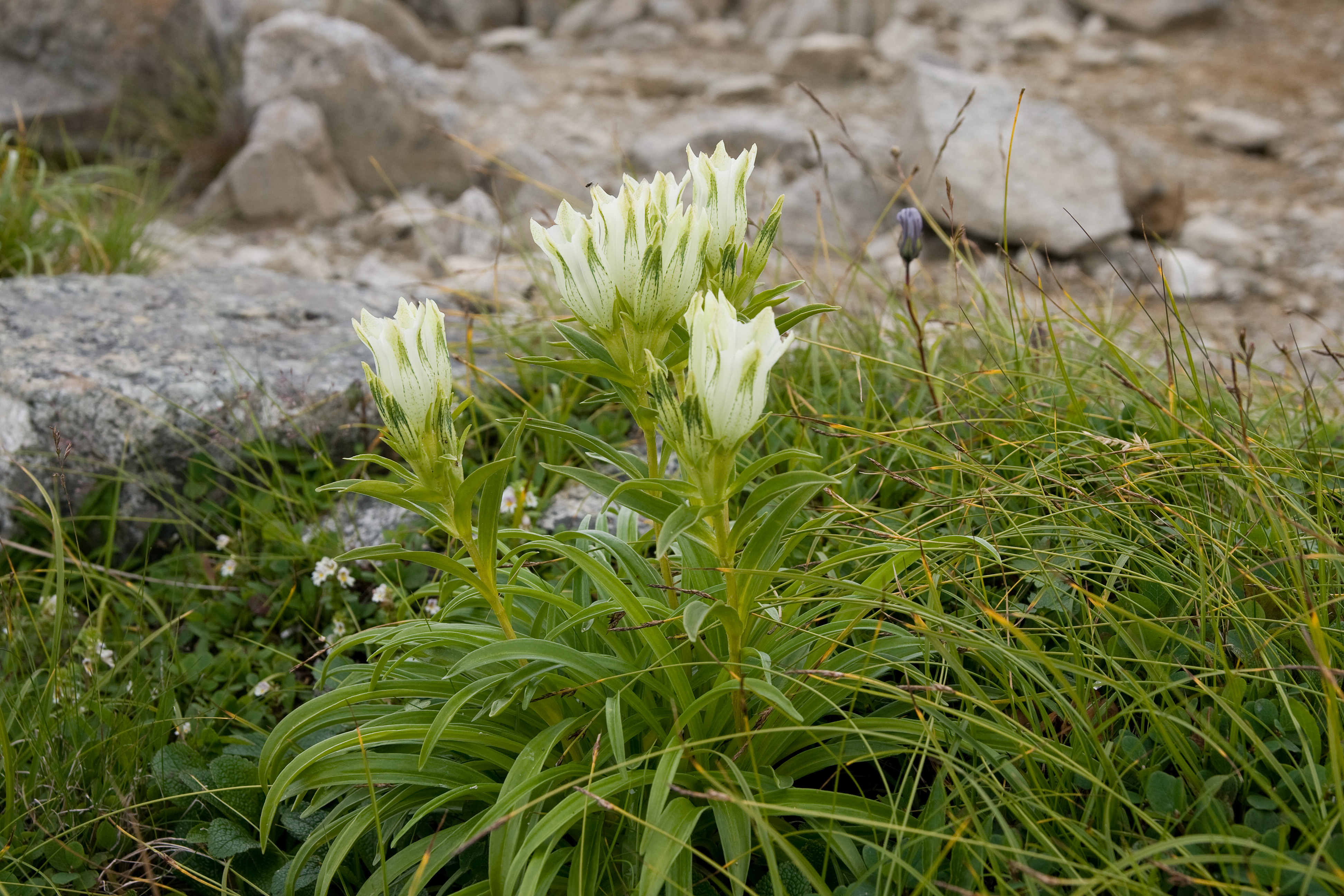 トウヤクリンドウ (学名：Gentiana algida)